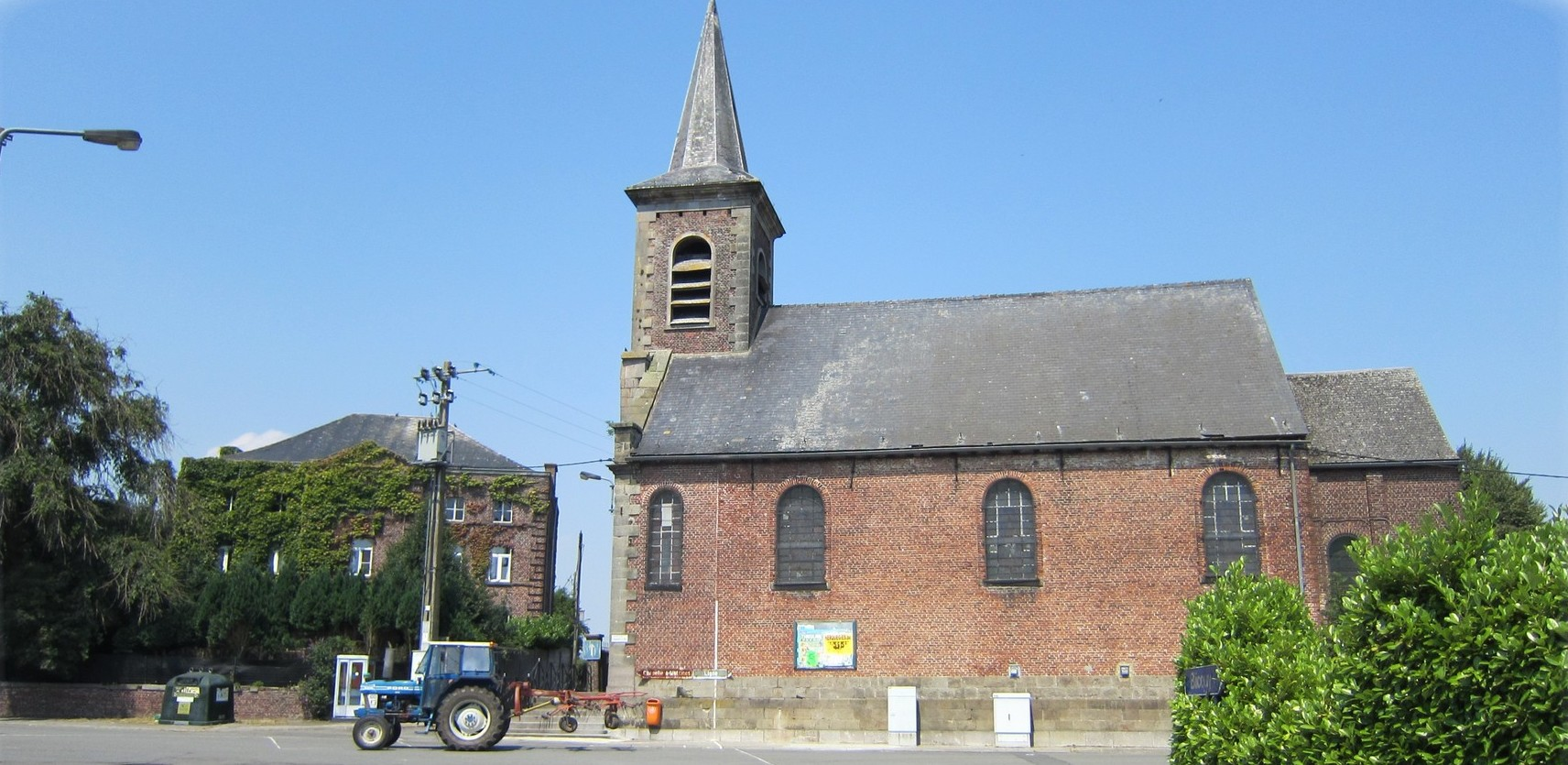 L'église de Chapelle-à-Oie.